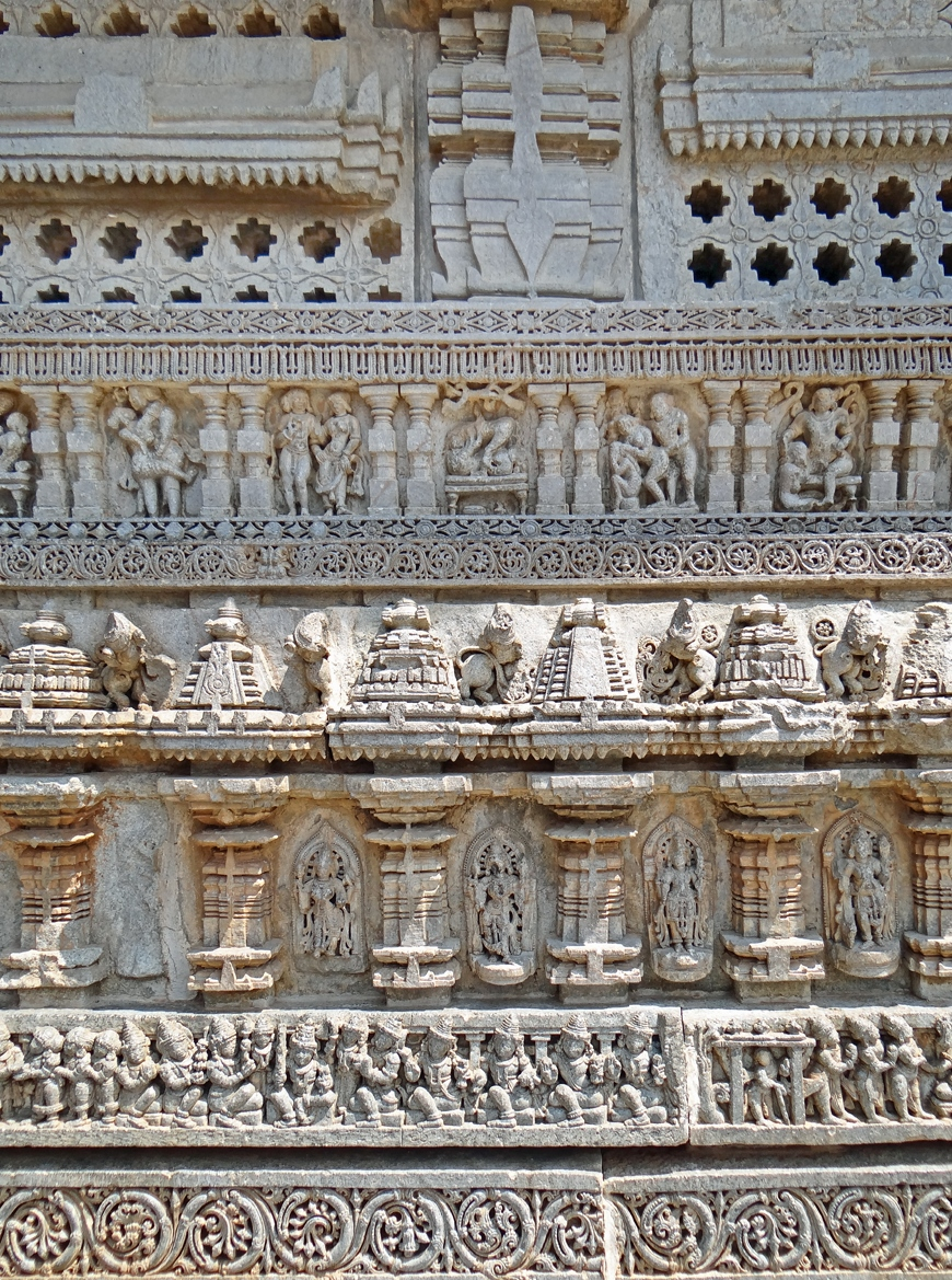 Frise sculptée sur les murs extérieurs du temple de Chennakesava (ou Chennakeshava) à Somnathpur (ou Somanathapura) Sur le registre supérieur, figurent des représentations de Mithunas (accouplement rituel) L'édification de ce temple de style Hoysala date de 1269. C'est Somanatha, un des généraux du roi hoysala Narashimha III (1254-1291) qui en est le commanditaire initial. C'est l'un des plus beaux temples indiens de la période médiévale. L'état de conservation de la structure et des décors est remarquable. Ce temple est composé de trois sanctuaires dédiés à Vishnou (Kesava, Venugopala, Janardhana), surmontés chacun d'un sikhara et reliés entre eux. Il est construit sur une plateforme en étoile et entouré d'une enceinte à galerie comprenant 64 chapelles secondaires. Les murs extérieurs et intérieurs ainsi que les colonnes sont très richement décorés de reliefs sculptés. Les sculpteurs ont pour la plupart signé leurs oeuvres. Sites de référence